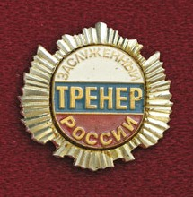 Знак к почётному спортивному званию «Заслуженный тренер России»